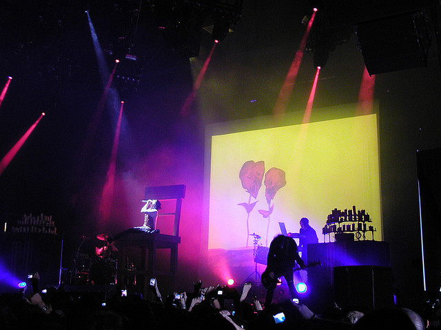 Escenario de Marilyn Manson en la gira Rape of the World Tour